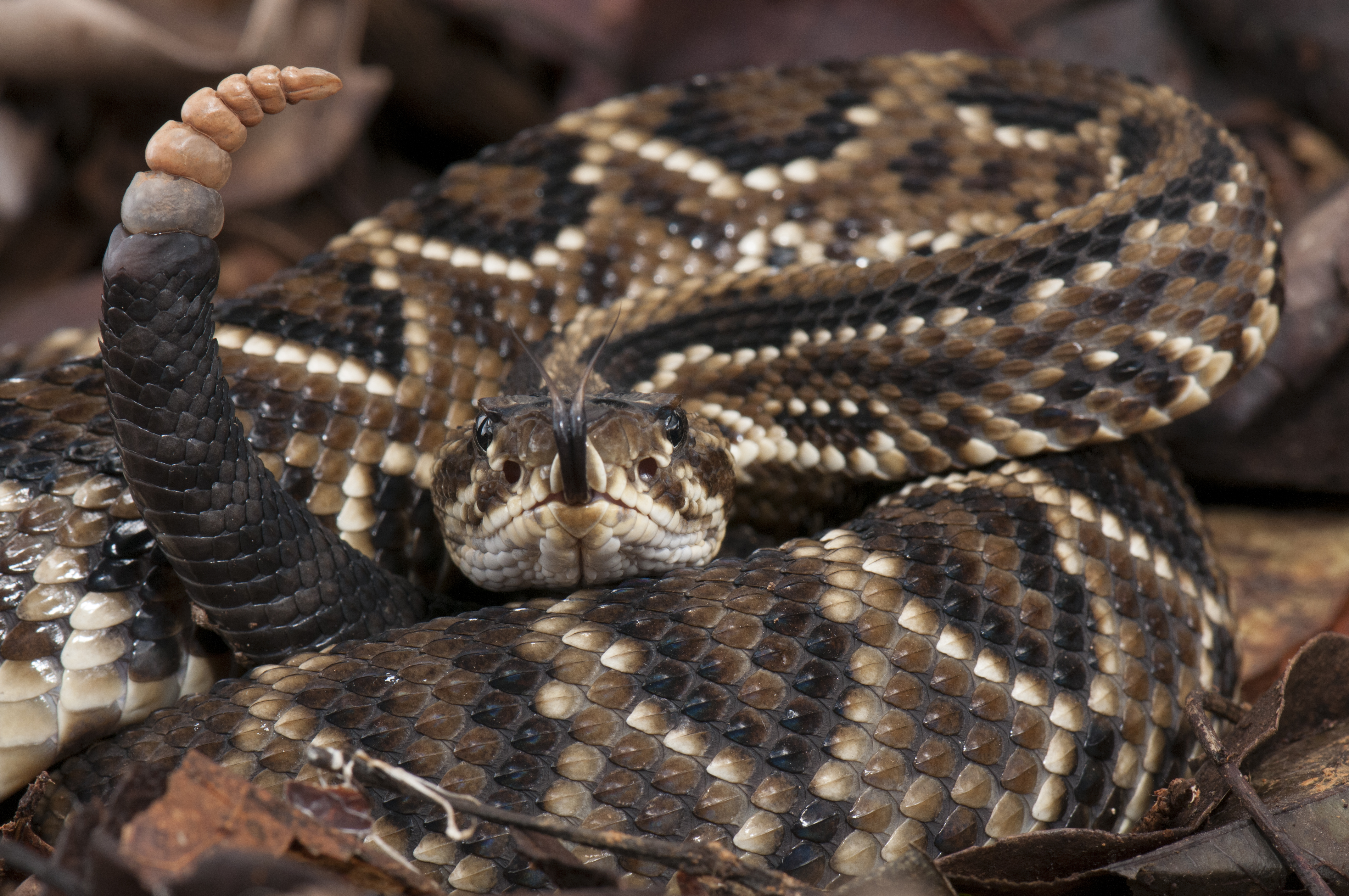 Cascavel - Crotalus durissus, espécie peçonhenta e muito popular, o guizo ou chocalho na ponta de sua cauda vibra na presença de predadores como um tentativa de intimidação.